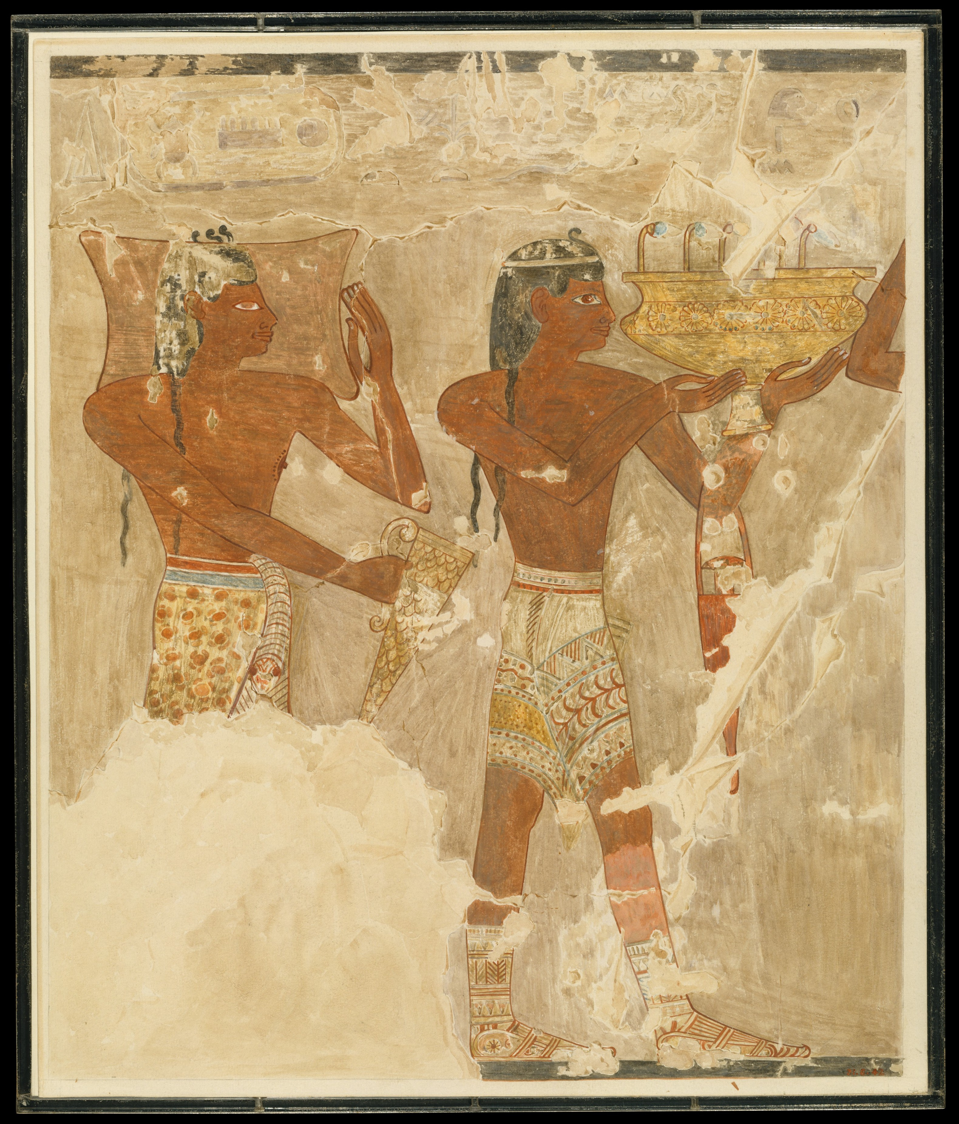 fac-similé peint par la Nina de Garis Davies d'une scène de la tombe de Rekhmire